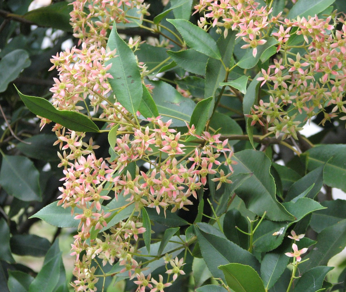 Ceratopetalum apetalum, Maranoa Gardens, Balwyn, Victoria, Australia.